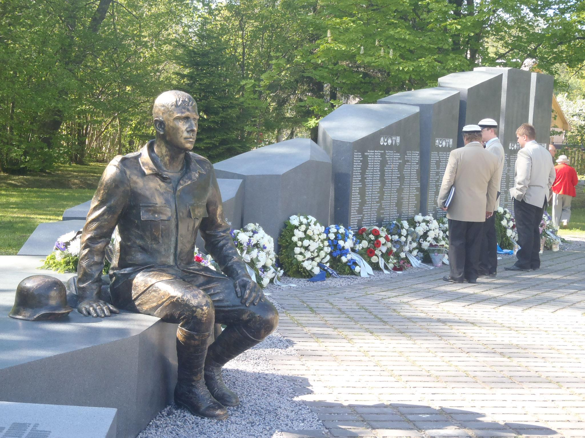 Teises maailmasõjas hukkunud hiidlaste mälestusmärk. Skulptor Elo Liiv.